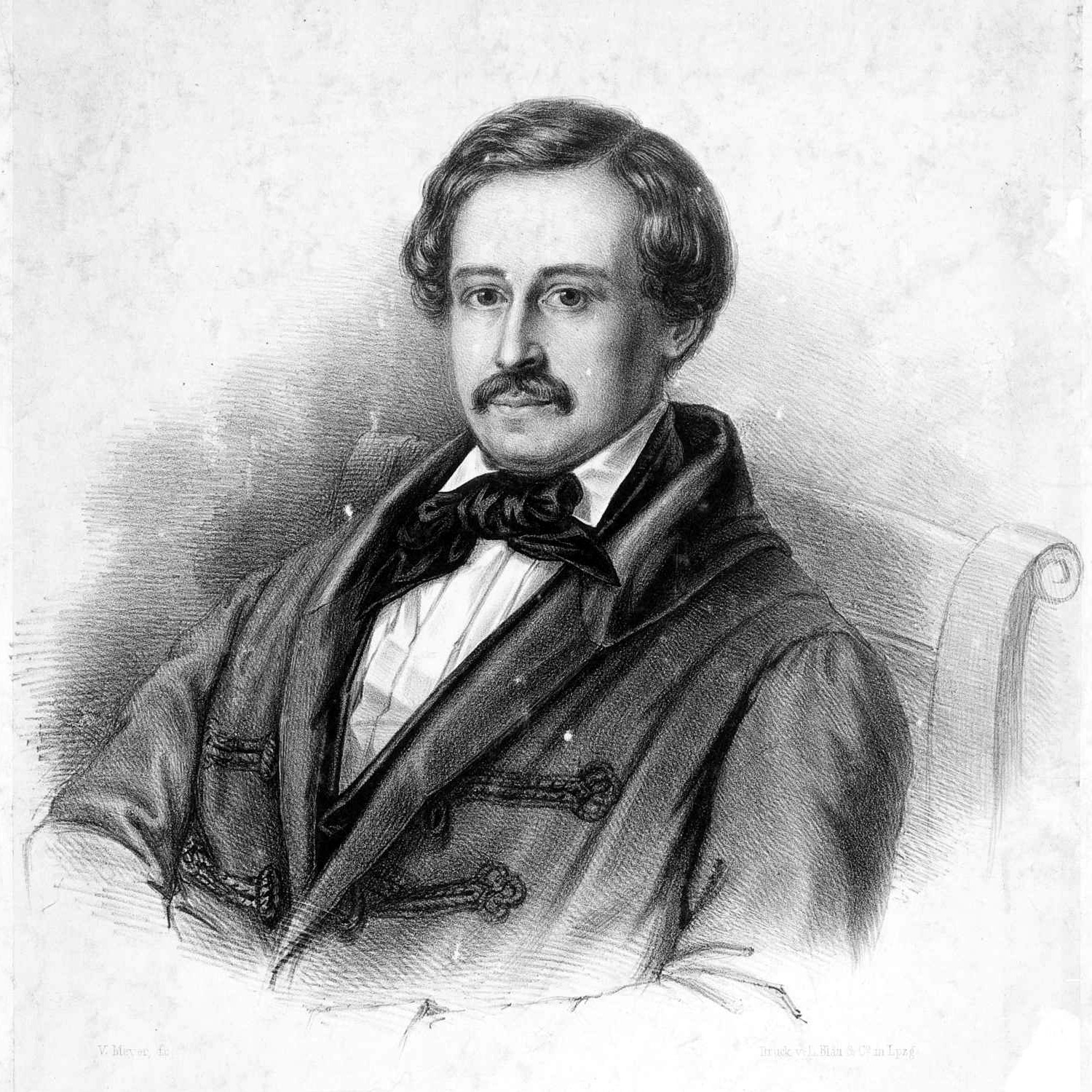 Portrait Franz Brendel (1811-1868)